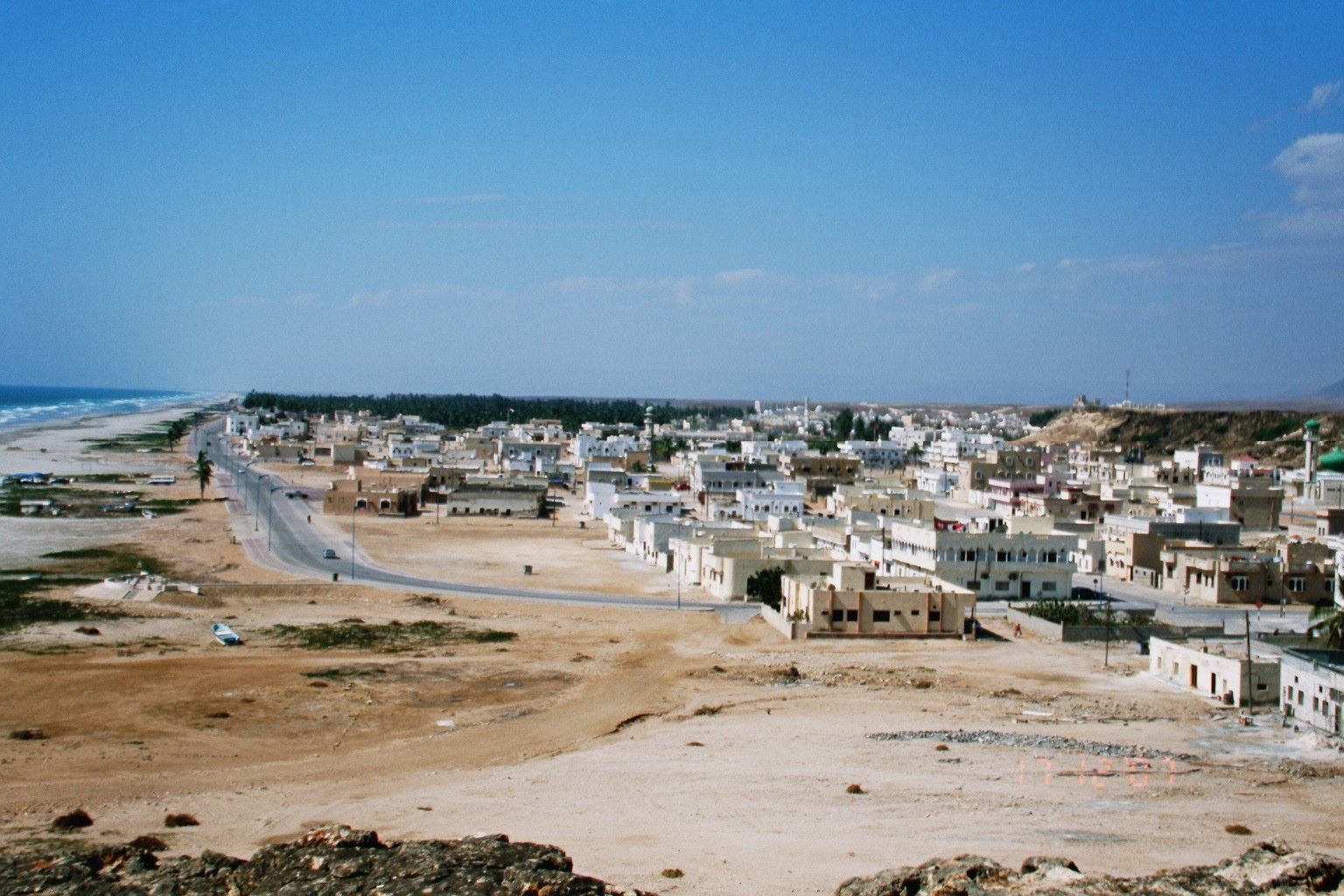 Taqah (Dhofar, Oman)